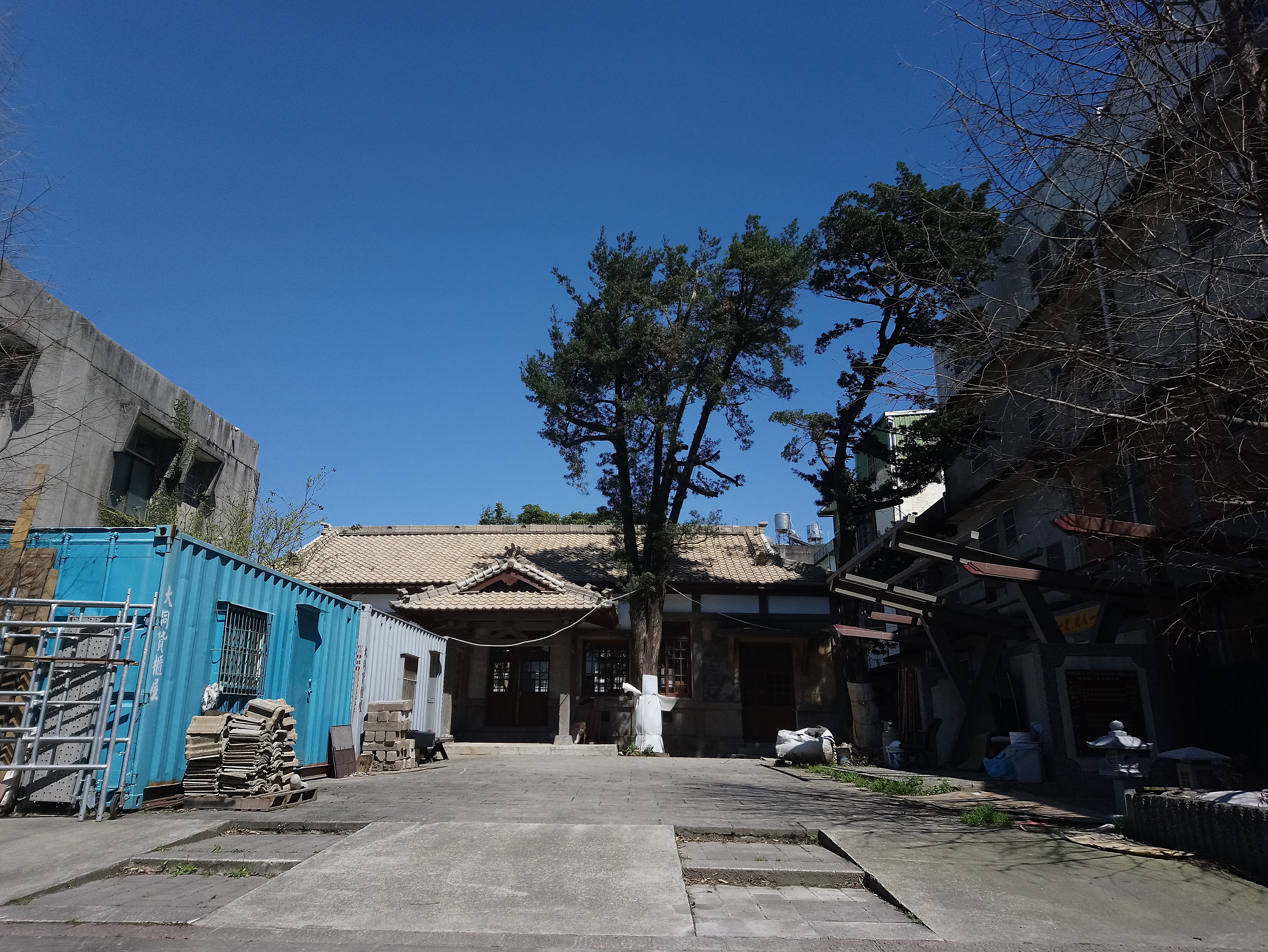 整修中的龍潭武德殿,桃園市龍潭區龍星里